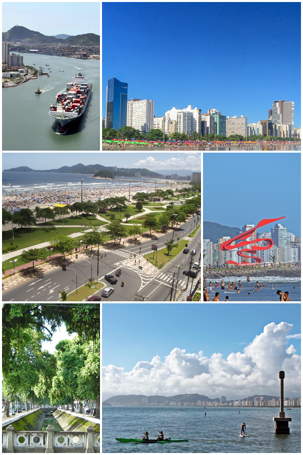 Montagem de fotos de Santos.